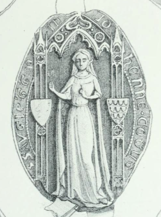 Jeanne de Guînes, fille de Baudouin IV comte de Guînes